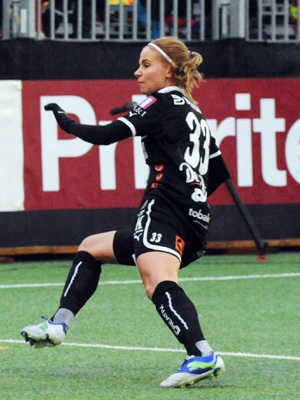 Tyresö, 16 aprile 2013: incontro di Damallsvenskan 2013 Tyresö FF vs Umeå IK 1-0.